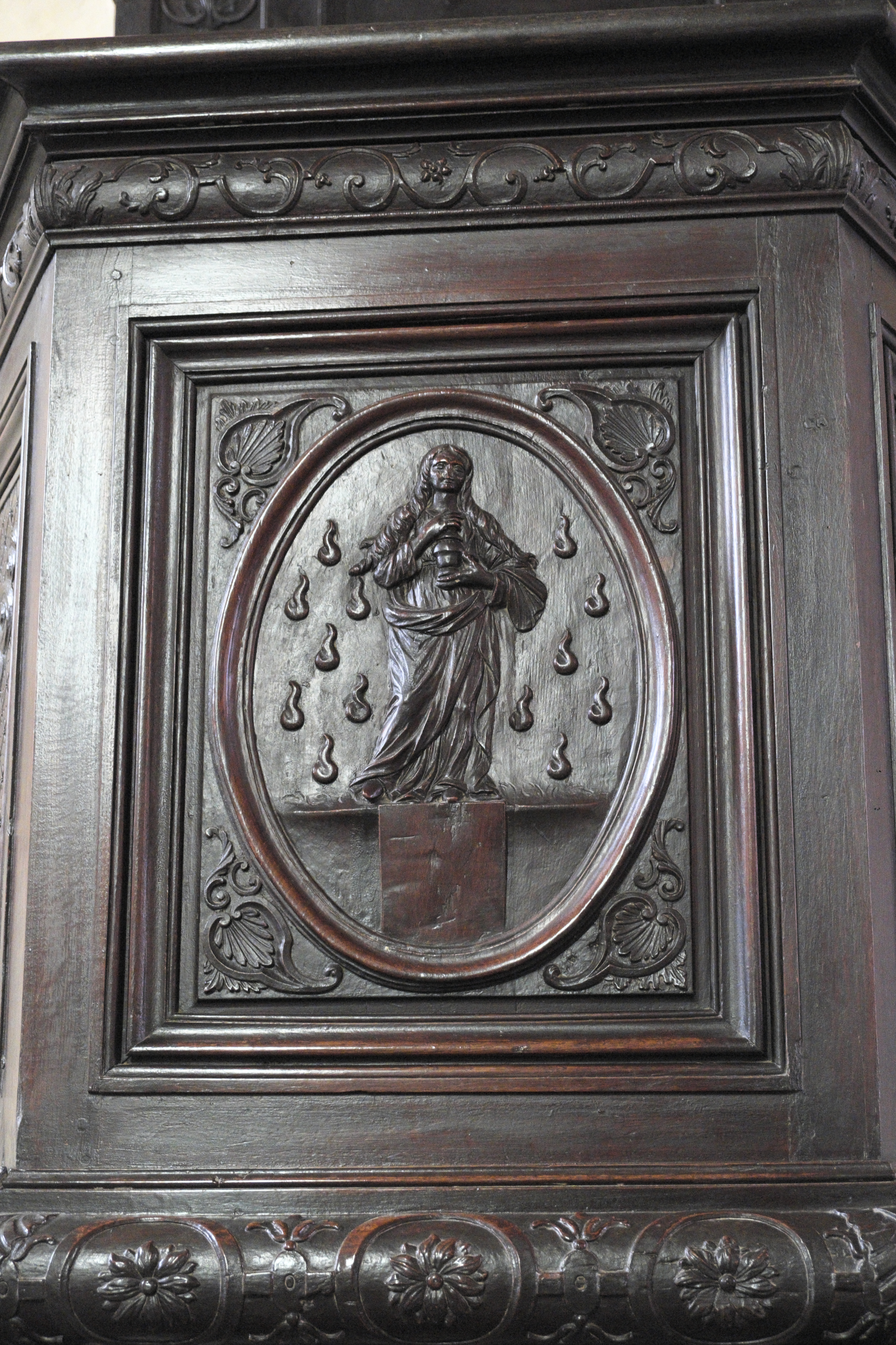 Kirche Sainte-Marie-Madeleine, ehemalige Stiftskirche Notre-Dame, in Champeaux im Département Ille-et-Vilaine (Region Bretagne/Frankreich), Kanzel aus dem 18. Jahrhundert